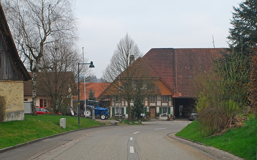 Hersiwil, Hauptstrasse